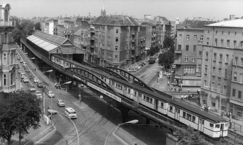 ADN-ZB Settnik 14.8.84 Berlin: "Schönhauser" - Porträt einer Straße Geprägt wird die Schönhauser Allee durch die als Hochbahn verkehrende U-Bahn. Die Entwürfe für diese Anlage einschließlich der beiden Bahnhöfe Dimitroffstraße un Schönhauser Allee, schufen Alfred Grenander und Johannes Bousset. Am 25.7.1913 wurde die Linie Alex-Nordring eröffnet. Erst 1930 wurde sie bis Pankow verlängert. Von den Berlinern wird die Anlage scherzhaft aber liebevoll als "Magistratsschirm" bezeichnet. Zahlreiche Geschäfte beiderseits der Straße laden zum Bummeln und Kaufen ein und geben ihr ein besonderes Flair. Sie ist jedoch nicht nur eine der bekanntesten Straßen, sondern auch eine der ältesten. Ihre Geschichte reicht bis ins Mittelalter zurück. Für den zu den außerhalb der Stadt liegenden Dörfern Pankow und Niederschönhausen führenden Weg gab es verschiedene Bezeichnungen. 1822-28 wurde er zur gepflasterten Chaussee ausgebaut. 1841 erhielt sie ihren heutigen Namen, wurde jedoch erst 1920 eingemeindet.